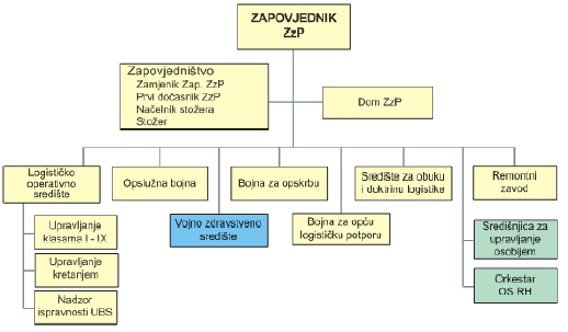 Organizacijska struktura Zapovjedništva za potporu Oružanih snaga Republike Hrvatske